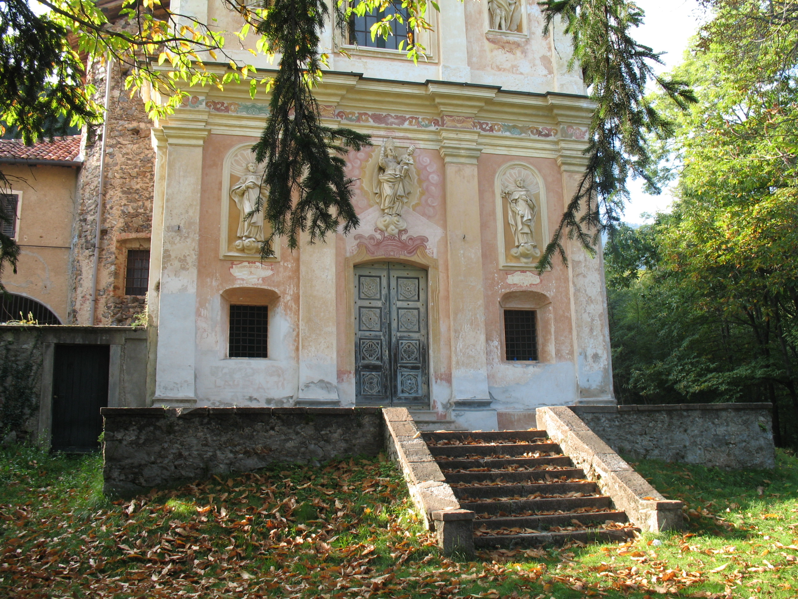 Santuario della Brugarola, ad Ailoche, comune in provincia di Biella, Piemonte, Italia)